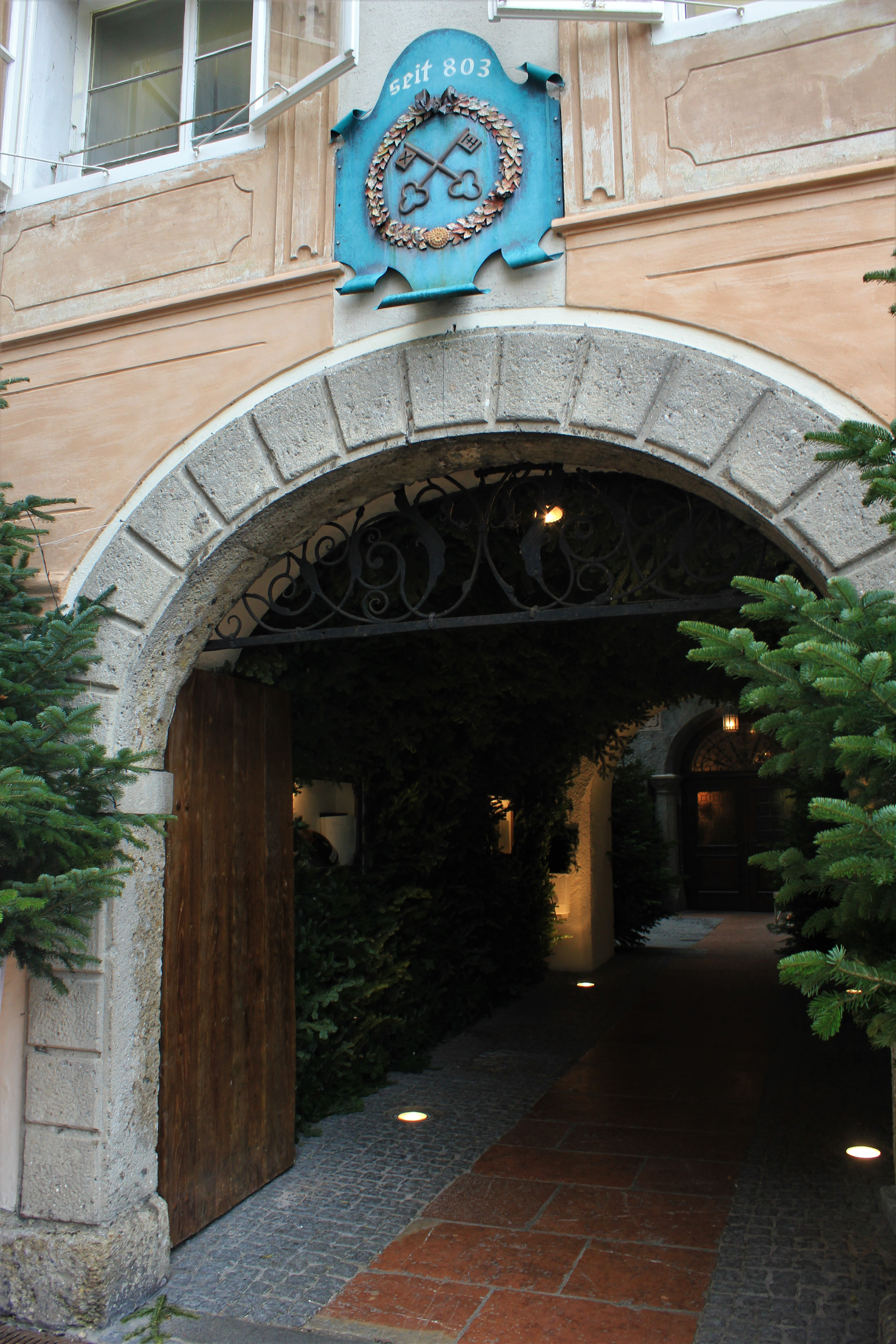 Eingang zum St. Peter Stiftskeller mit der Tafel "seit 803", dem Jahr der ersten urkundlichen Erwähnung der Gaststätte.